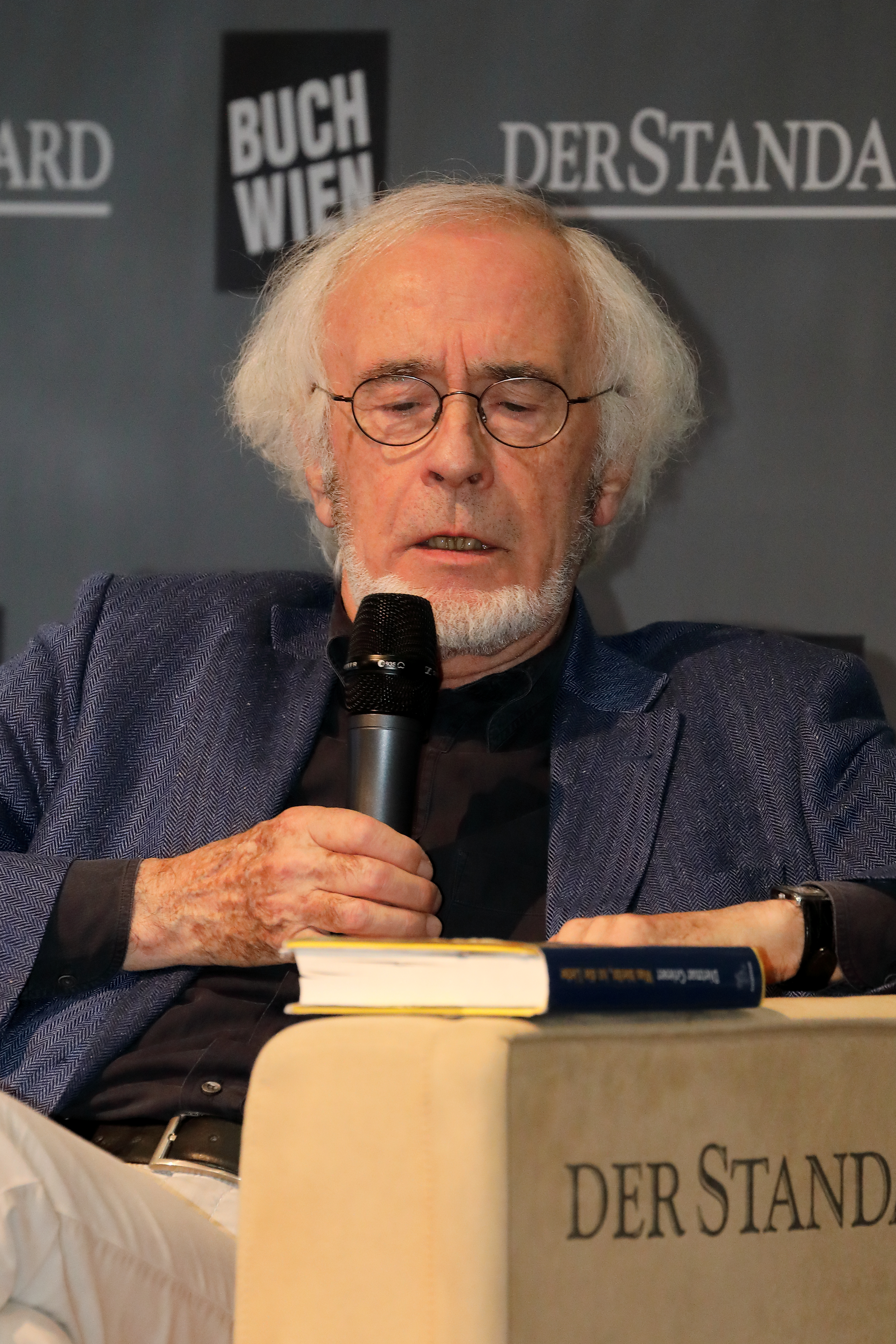 Der österreichische Journalist und Autor Dietmar Grieser bei der Präsentation seines Buches „Was bleibt, ist die Liebe“ auf der Standard-Bühne der Wiener Buchmesse 2018.